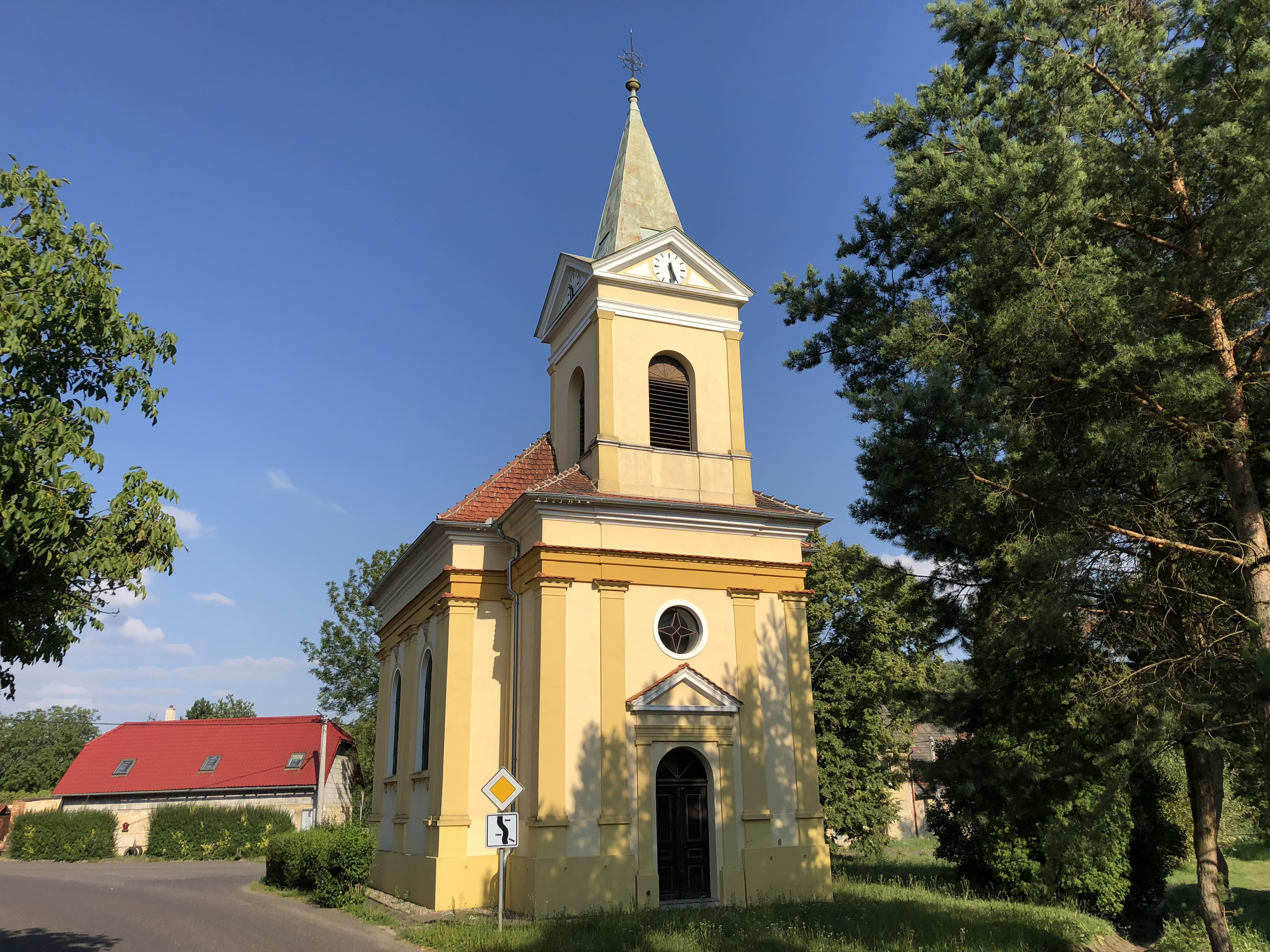 Průčelí kaple sv. Antonína Paduánského ve Velešicích